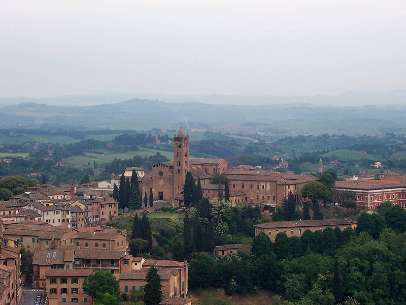 Siena - Basilica dei Servi vista dal Facciatone